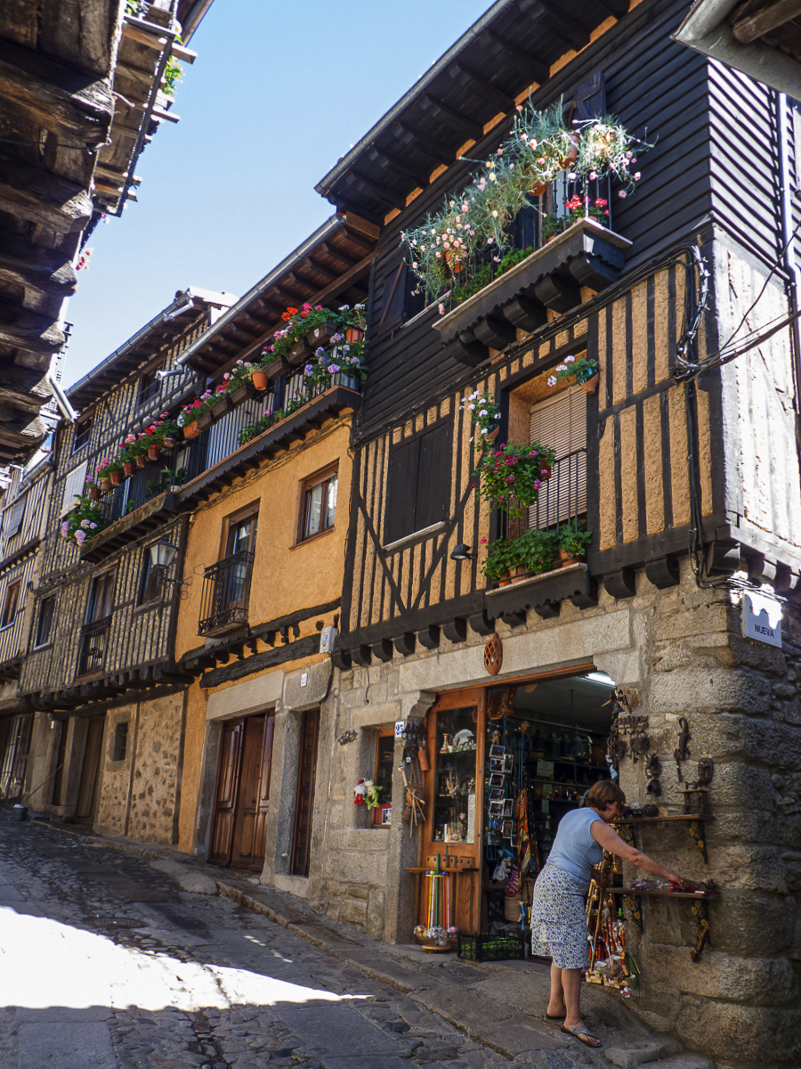 03082013 114738 ALBERCA 0140